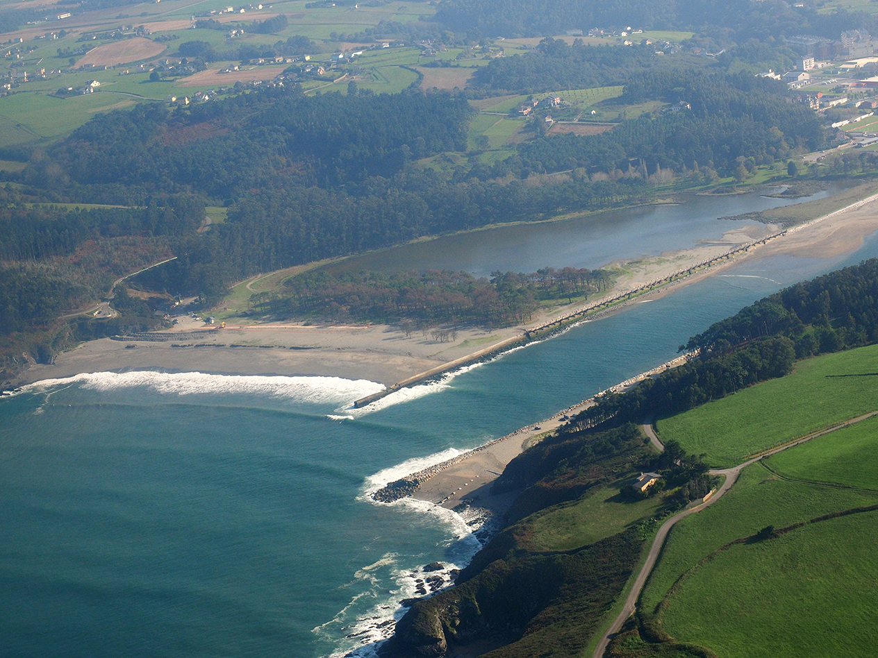 Desembocadura de la Ría de Navia, Asturias